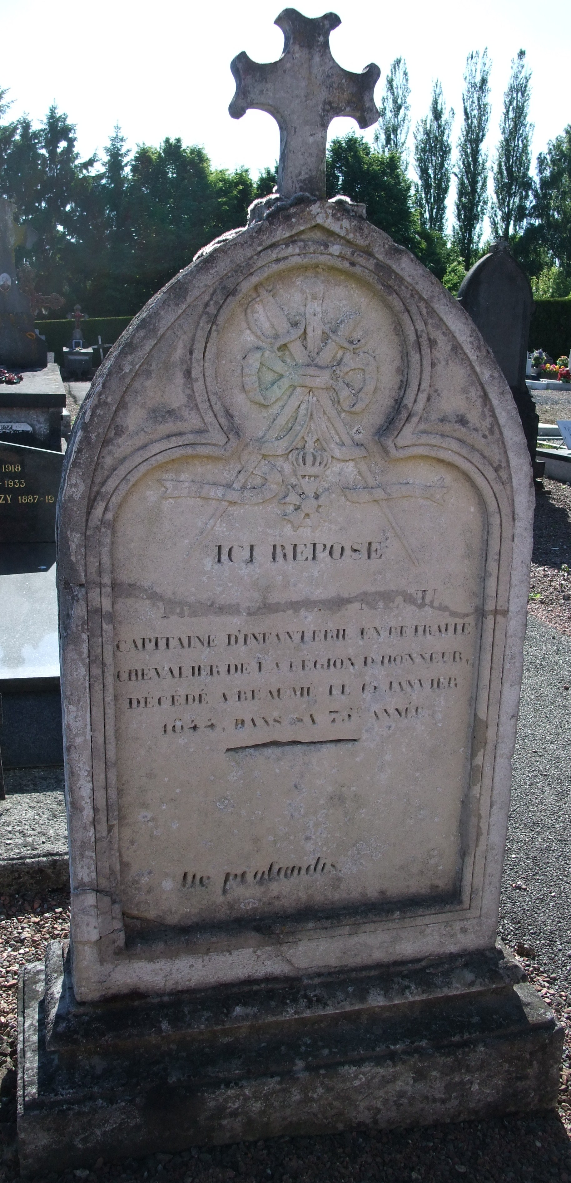 Tombeau (stèle funéraire) du capitaine d'infanterie Pierre Antoine Menu